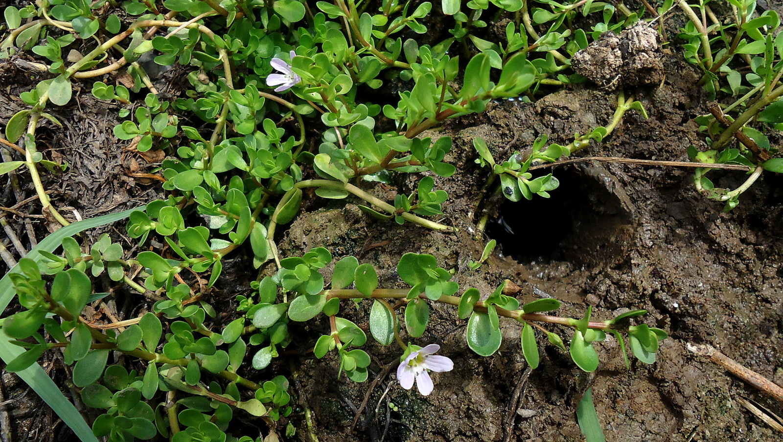 Bacopa monnieri (L.) Pennell